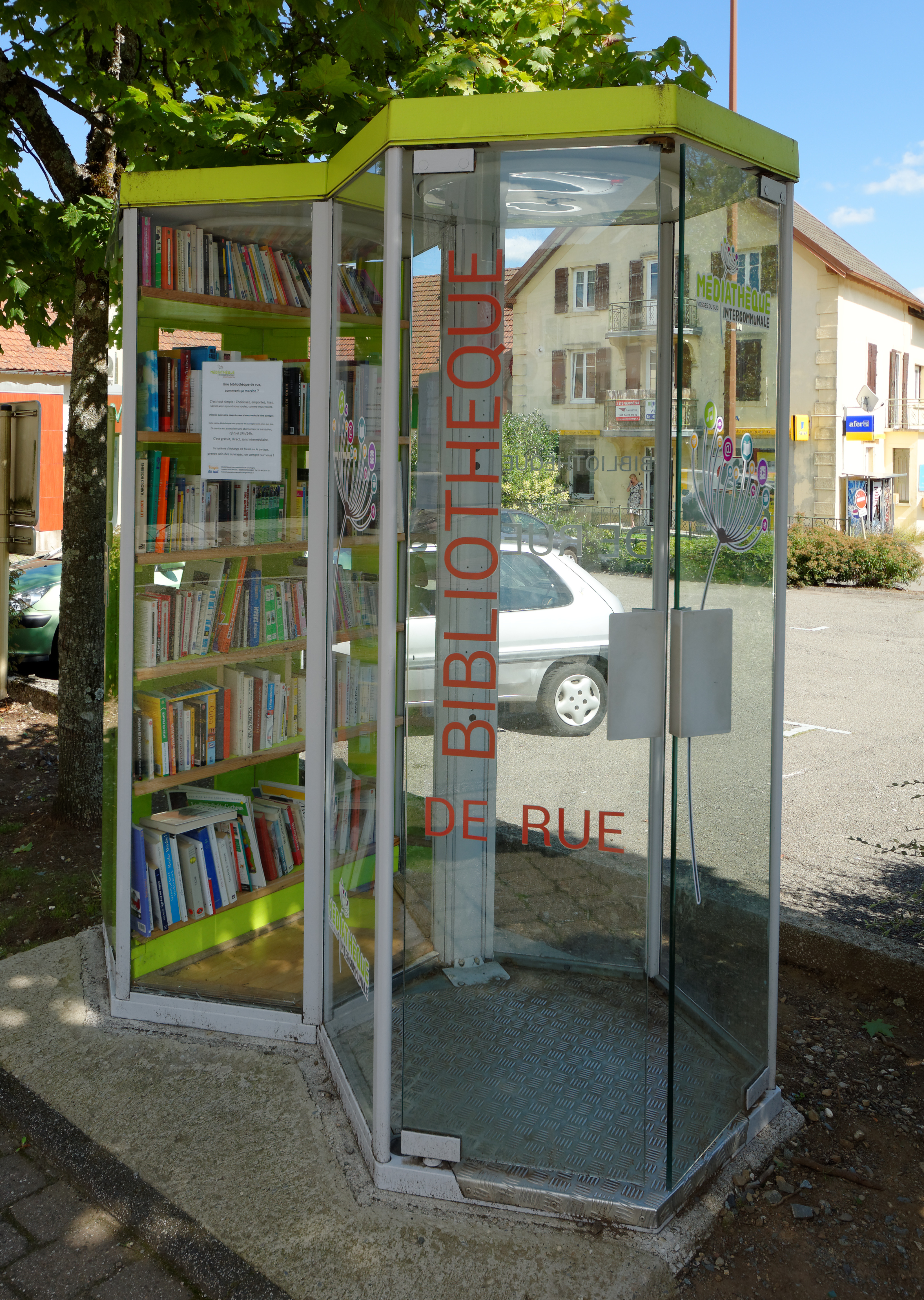 This picture as been uploaded as part of L'Été des régions Wikipédia. Deux cabines téléphoniques reconverties en microbibliothèque, à Giromagny.